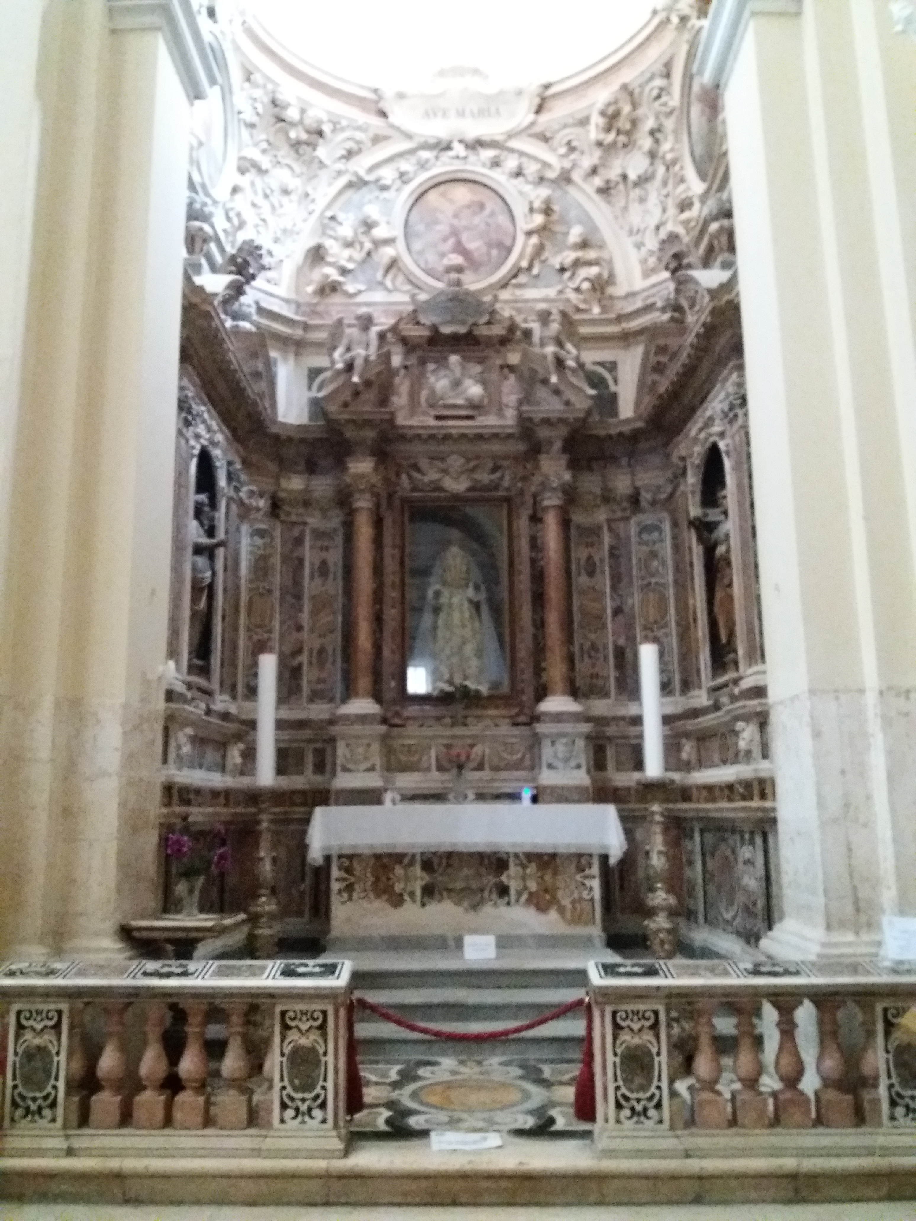 Sulmona: Chiesa della Santissima Annunziata